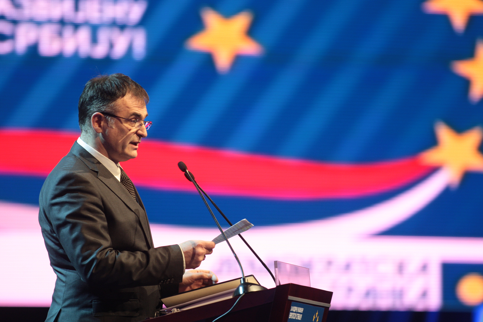 BEOGRAD, 18. Dec 2010. - XIV Izborna skupstina Demokratske stranke u Sava Centru. FOTO: Foto servis DS / KONTRAFOTO